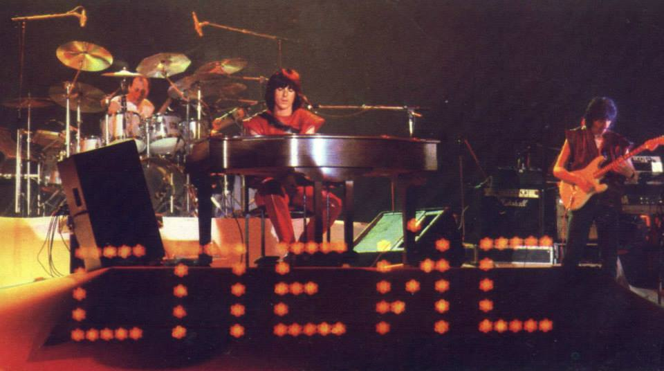 Didier Marouani's band Space performing at Olympic stadium, Moscow, in 1983. Cyrillic letters read "SPEYS" (i.e. transcription of the band's name).